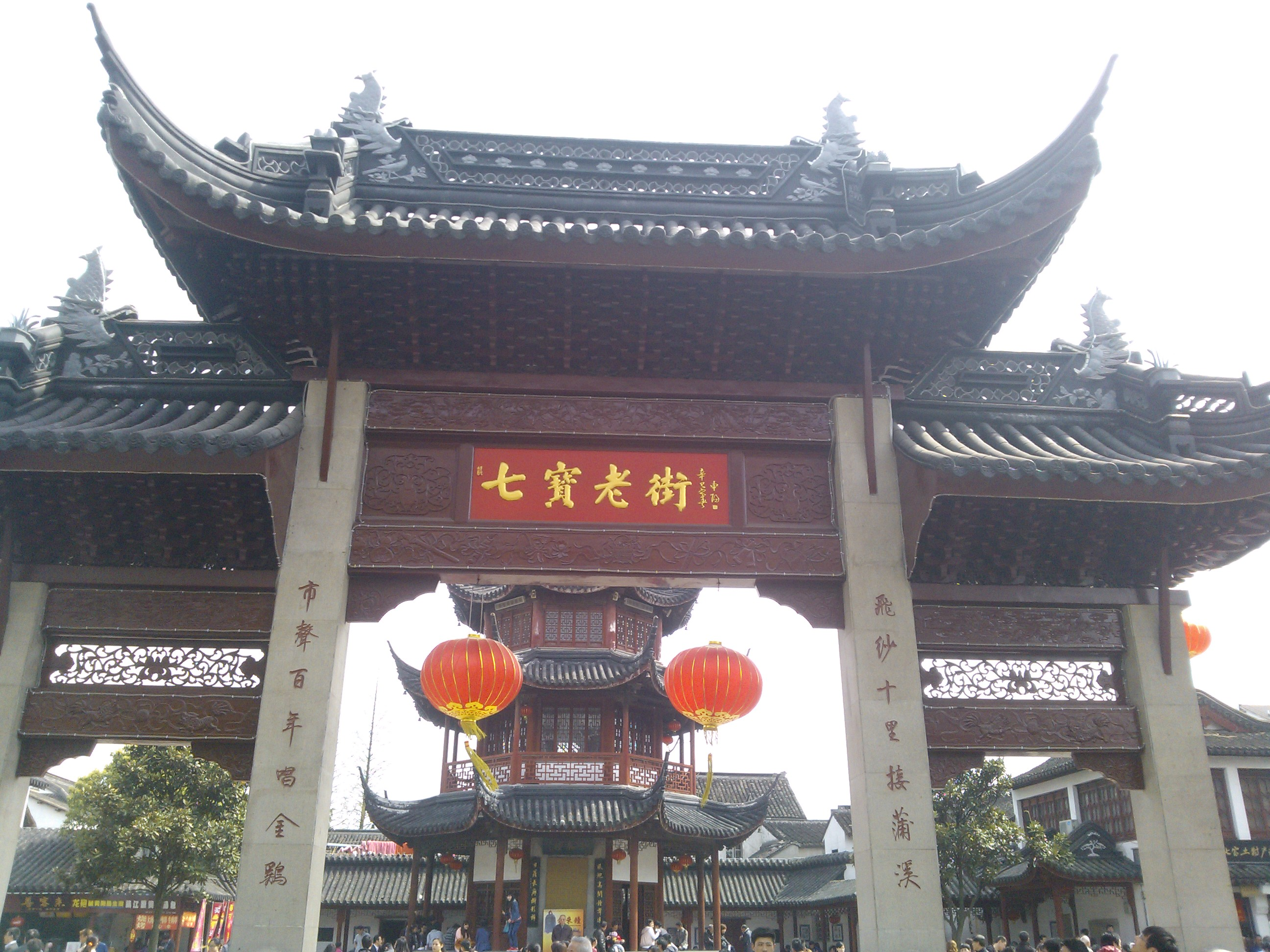 吴语: 七宝古镇进来额地方，有只塔。